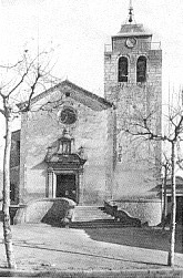 imatge de 1912 de: Església de Sant Genís a l'Ametlla del Vallès (Vallès Oriental-Catalunya), 1679.